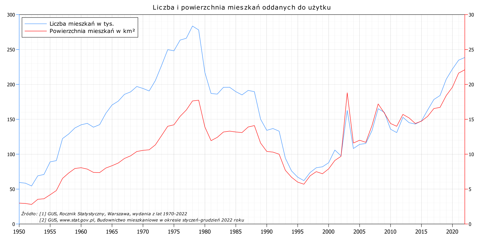 Powierzchnia i liczba mieszkań oddanych do użytku od 1950 roku Źródło: GUS